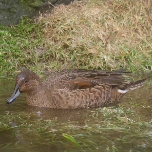 Eaton's Pintail (Anas eatoni)